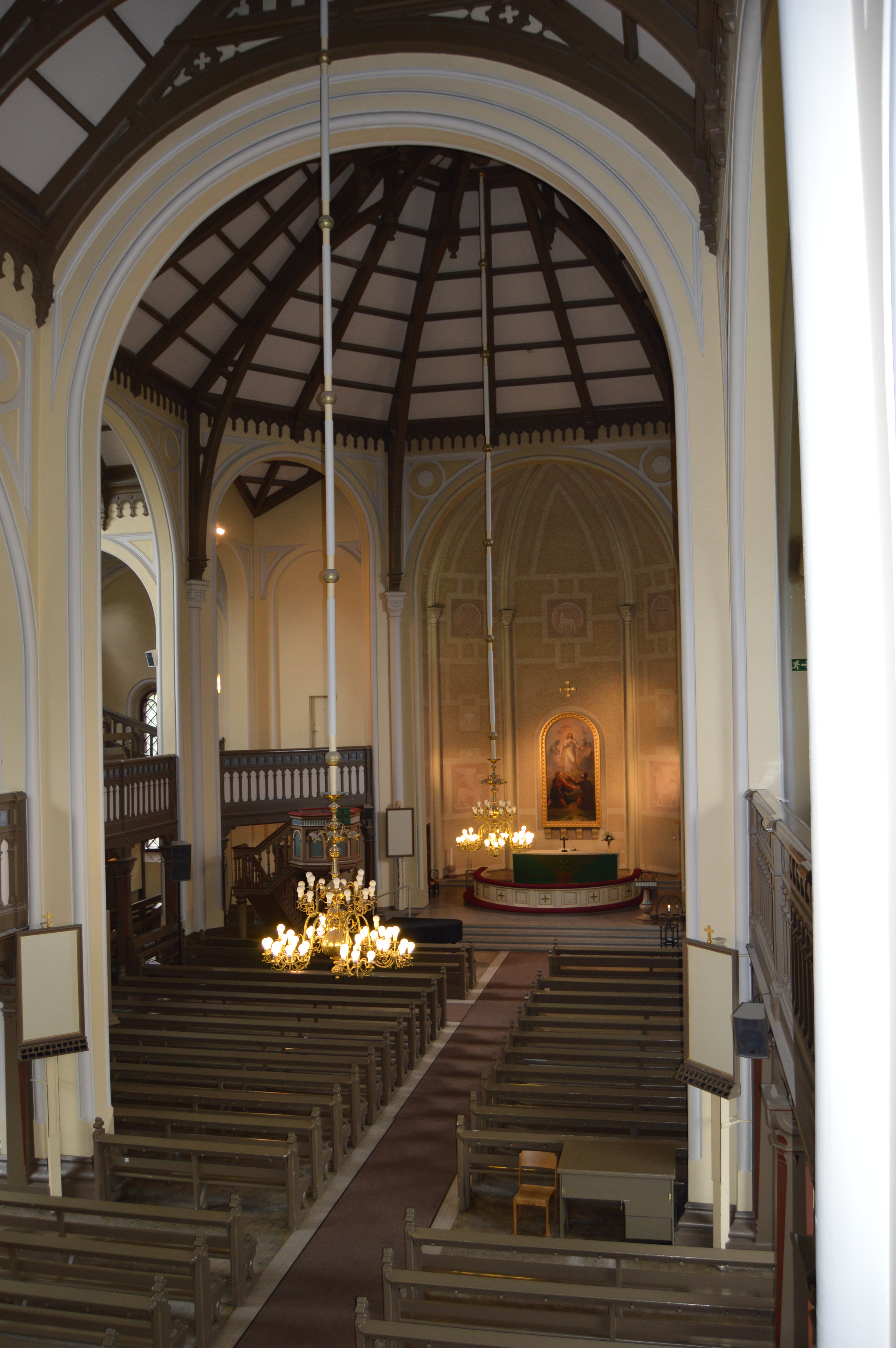 Tampereen Aleksanterin kirkko